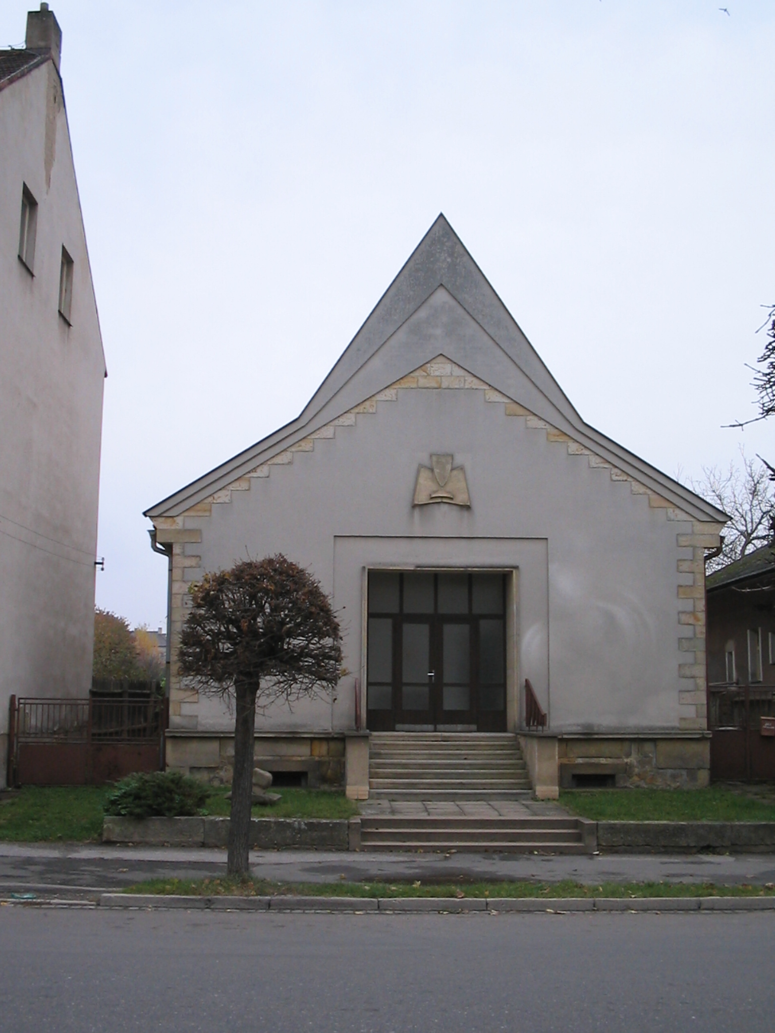 Kostel FS ČCE v Hořicích v Podkrkonoší